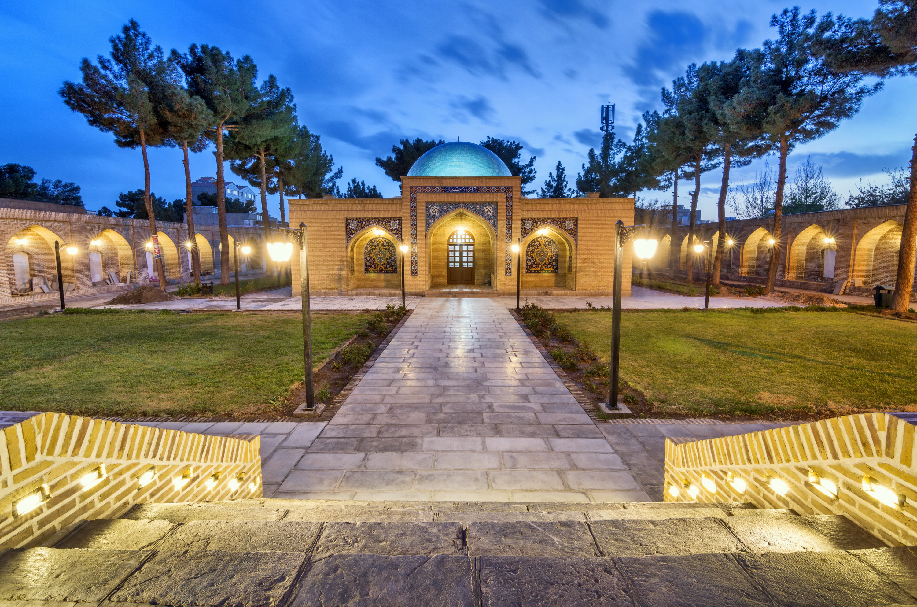 آرامگاه ملا هادی سبزواری